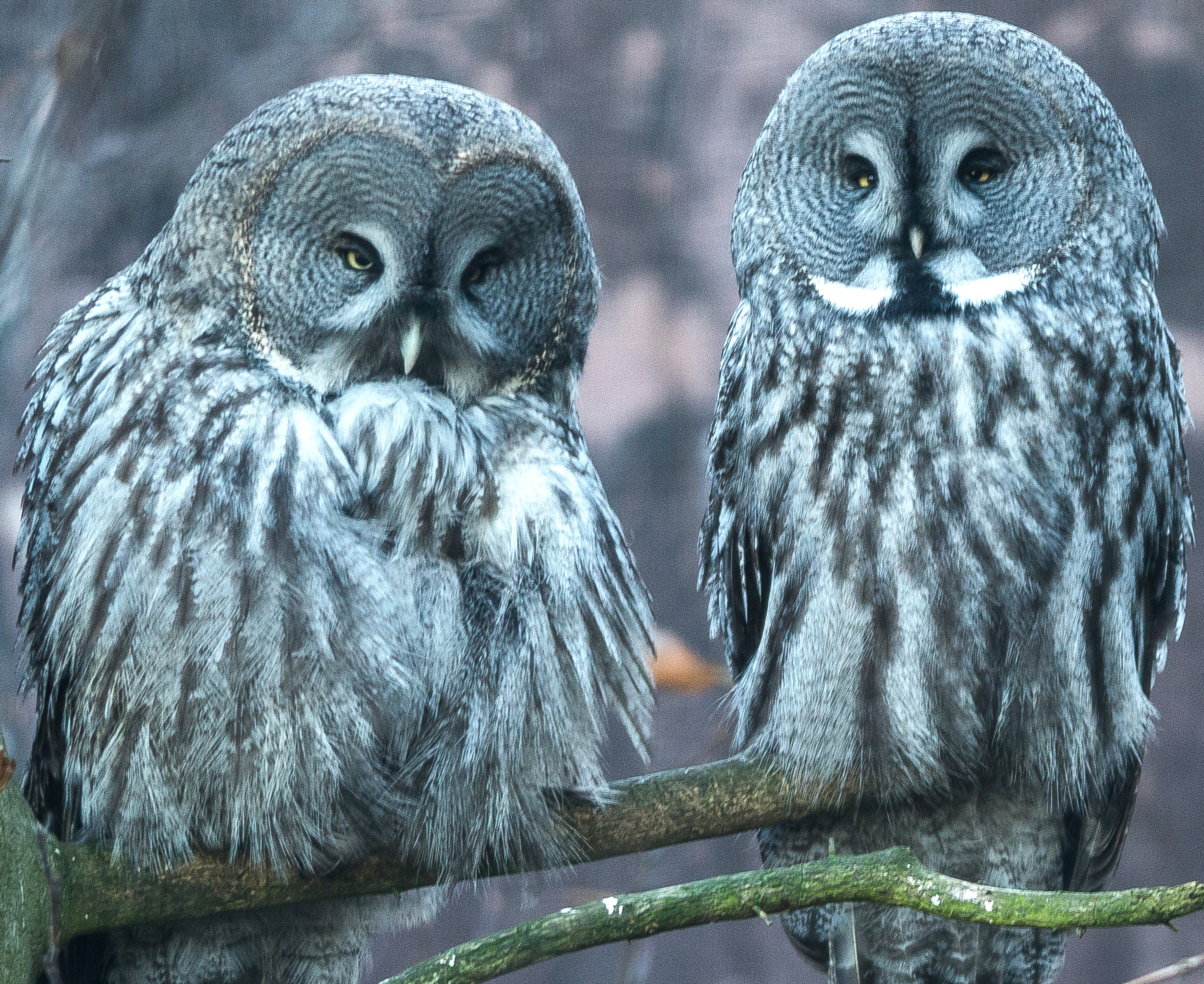 Lappuggla, Great grey owl, Strix nebulosa, at Skansen Stockholm Sweden